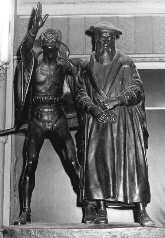 Leipzig, Faust-Mephisto-Gruppe Zum Beitrag: Hexenspaß und gediegene Gastlichkeit-Im berühmren Auerbachs Keller zu Leipzig ADN-ZB Gahlbeck 4.12.1987-ha. Die Geschichte von "Auerbachs Keller" ist eng mit der Legende vom Faßritt des Dr. Faustus verbunden. Die überlebensgroßen Bronzeplastiken von Prof. Mattheu Molitor, die Faust mit Mephisto auf der einen Seite am Eingang und die raufenden Studenten auf der anderen gegenüberliegenden darstellen, wo die Stufen hinabführen, weisen darauf hin. Hier die Faust-Mephisto-Gruppe. (Hierzu gehören 1987-1204-302-306N)